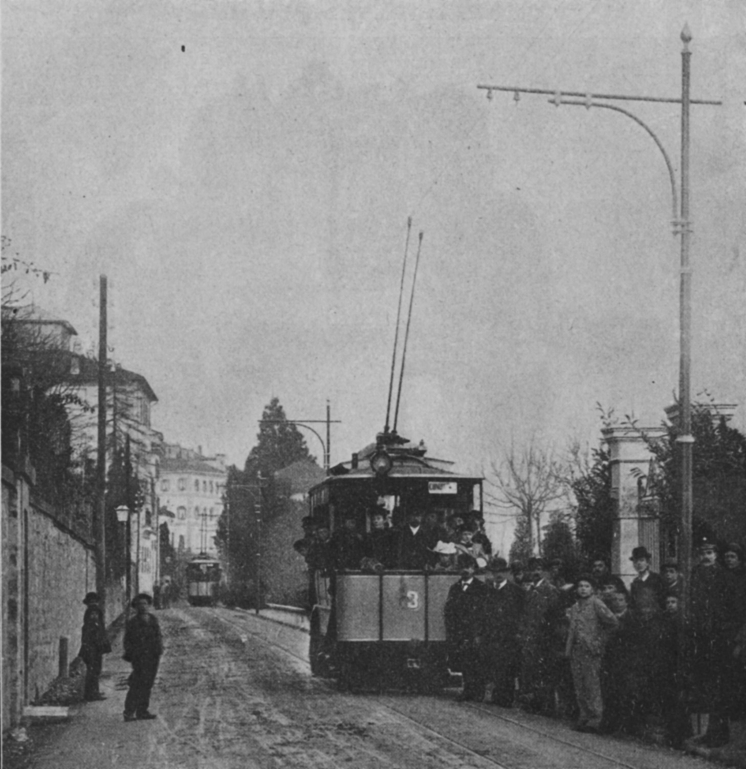 Triebwagen Ce 1/2 der Strassenbahn Lugano mit zwei Trolley-Stromabnehmer.